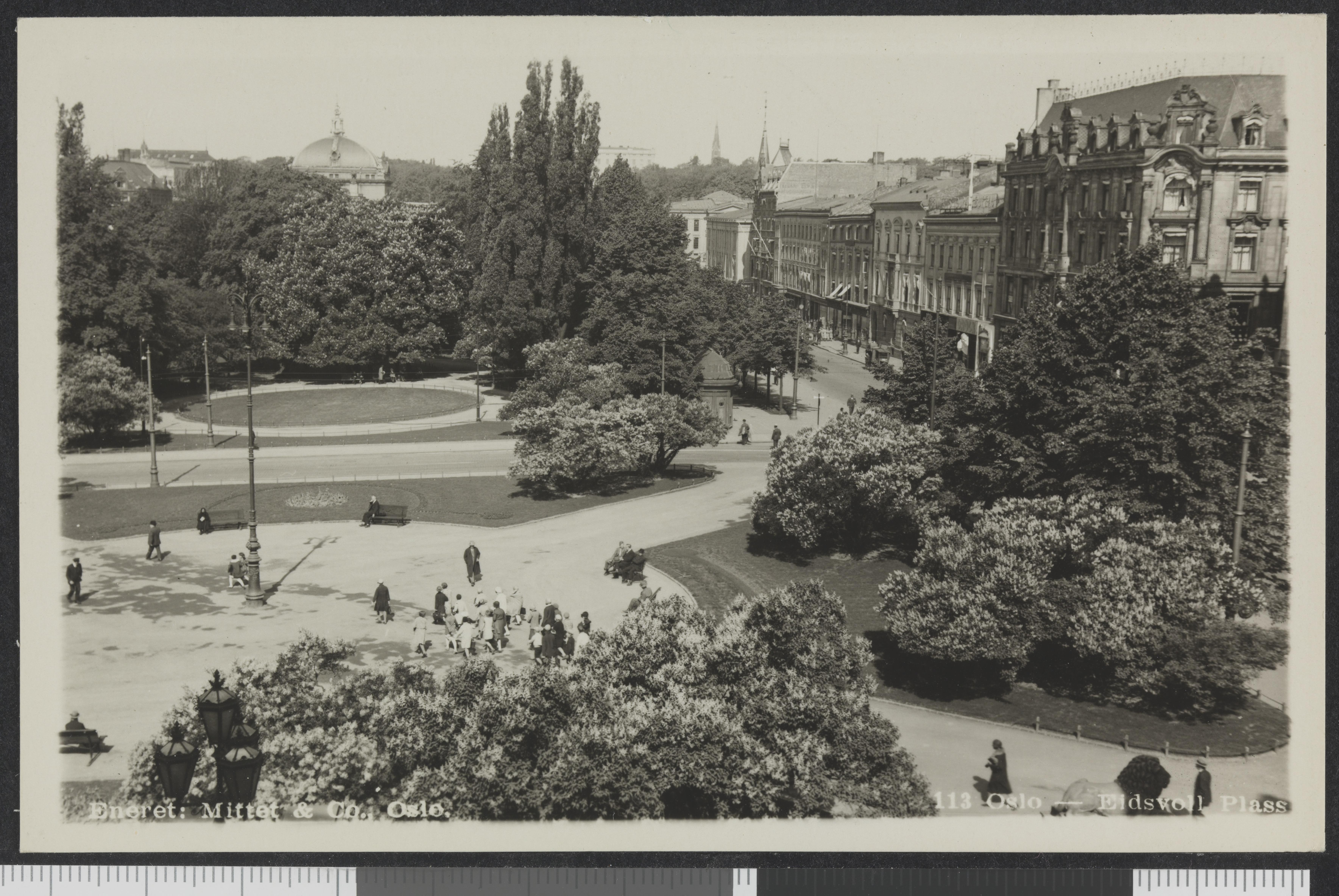 Bildet er hentet fra Nasjonalbibliotekets bildesamling Eidsvolls plass, Oslo, Oslo